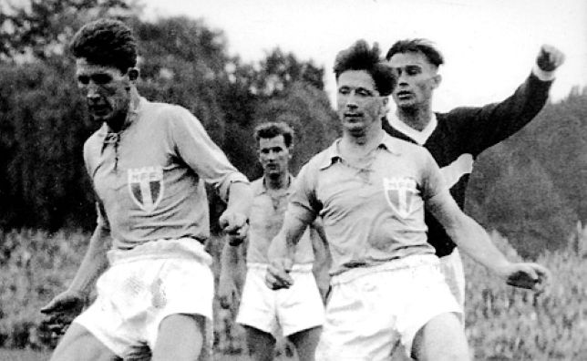 Sune Sandbring Malmö FF, till höger, i en match mor Spartak Moskva 1954.